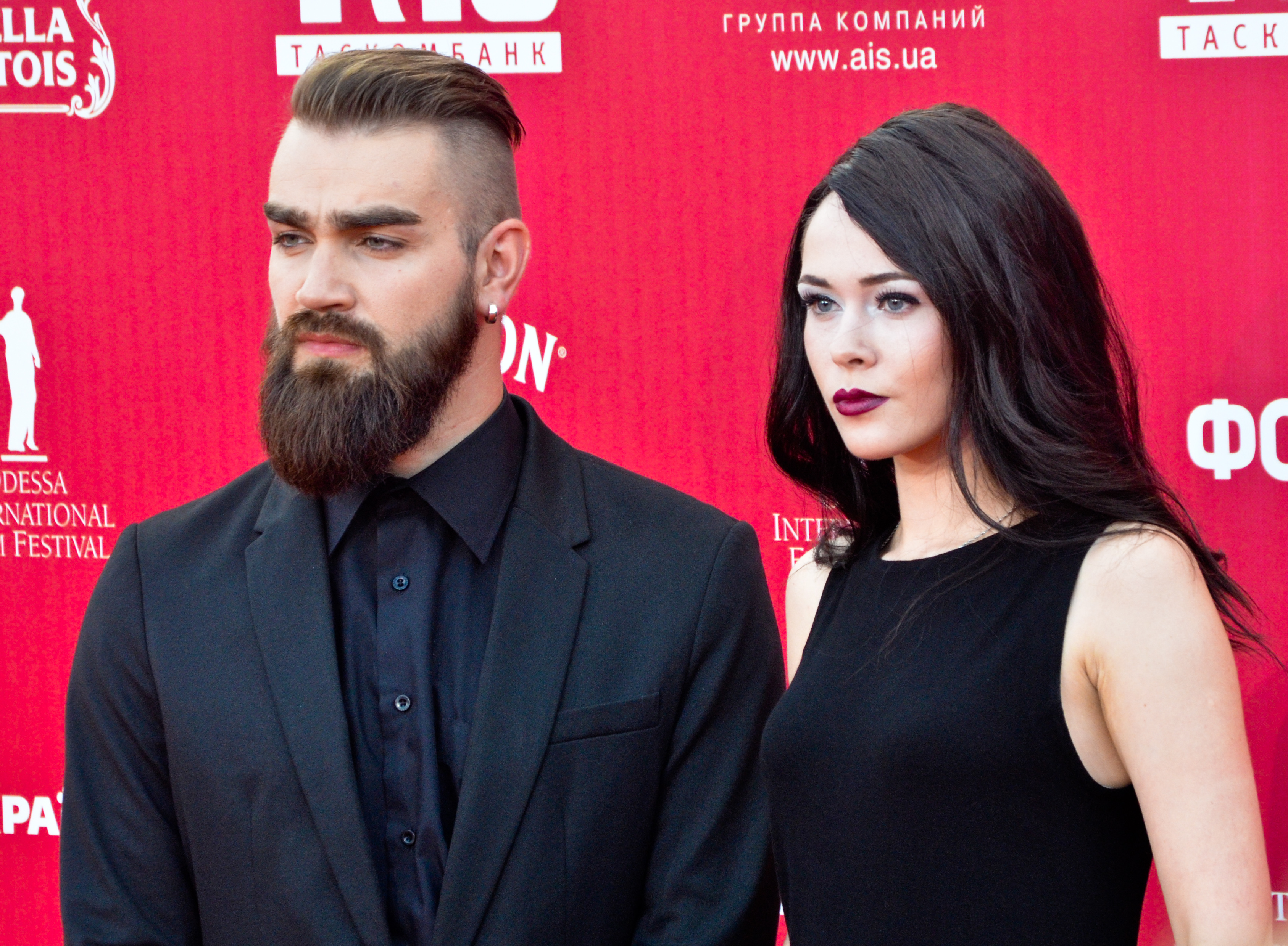 Val Bebko & Julia Sanina, Ukrainian musicians (The HARDKISS), at the 5th Odessa International Film Festival.